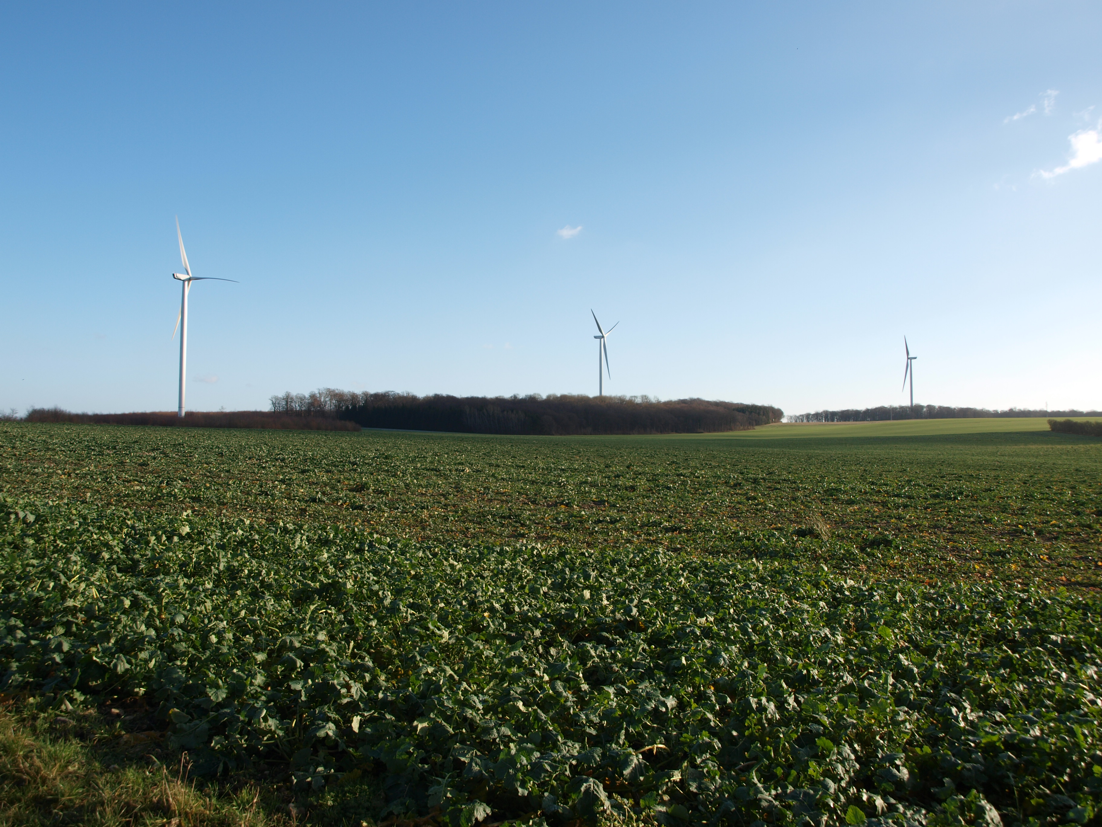 Voila les 3 Éoliennes de Coume